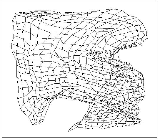 Som - nach 1000 Schritten